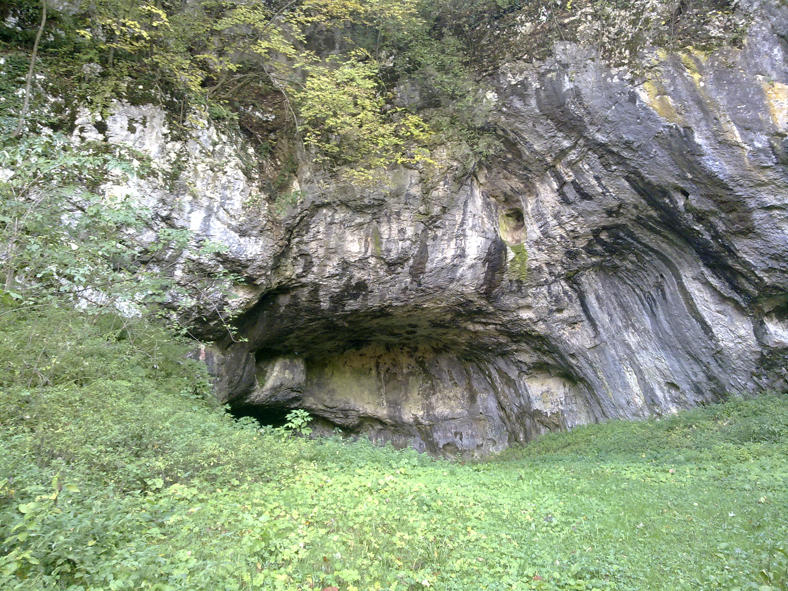 Hrustovacka Pecina